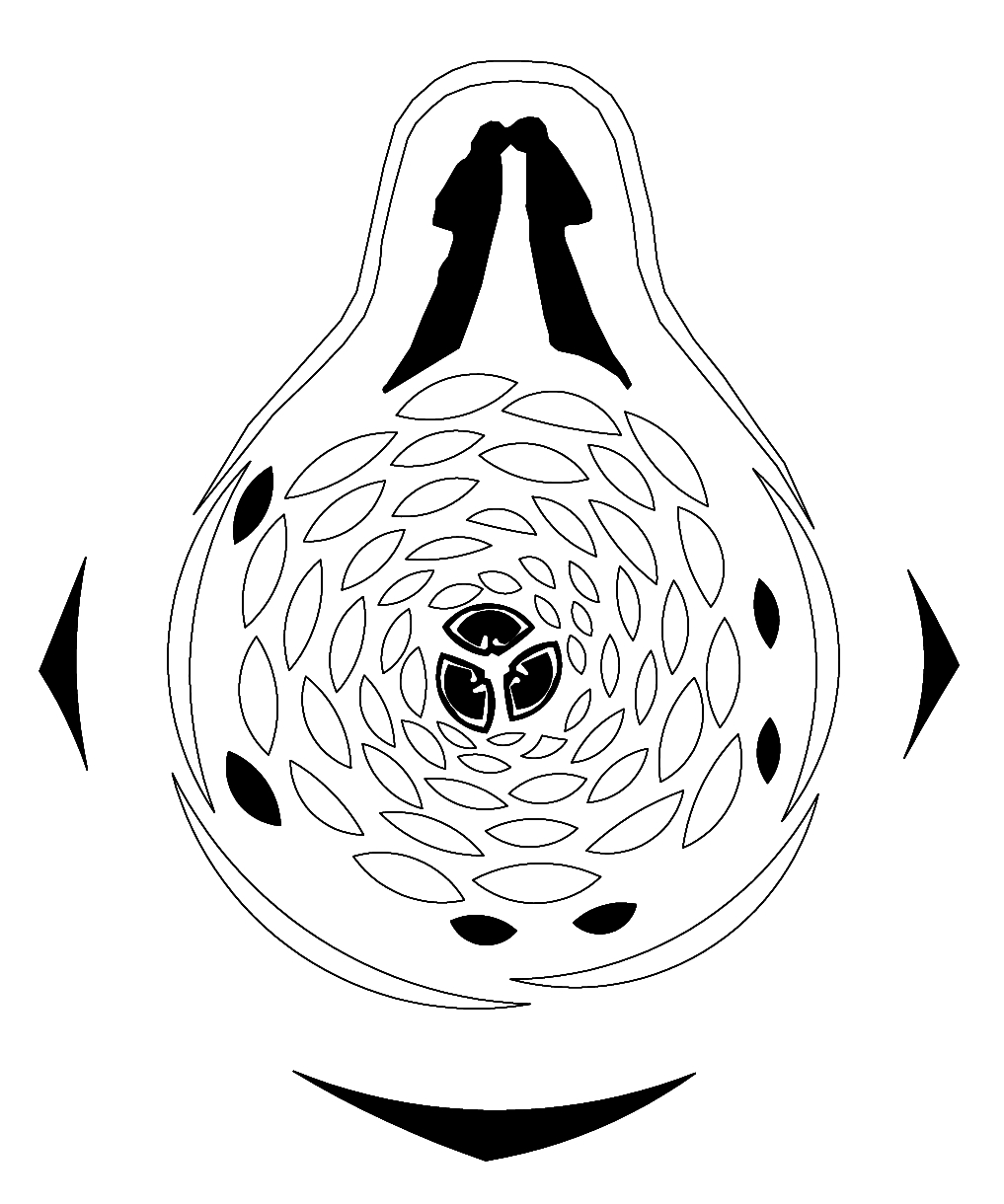 Tojad mocny (Aconitum firmum) - narys kwiatowy